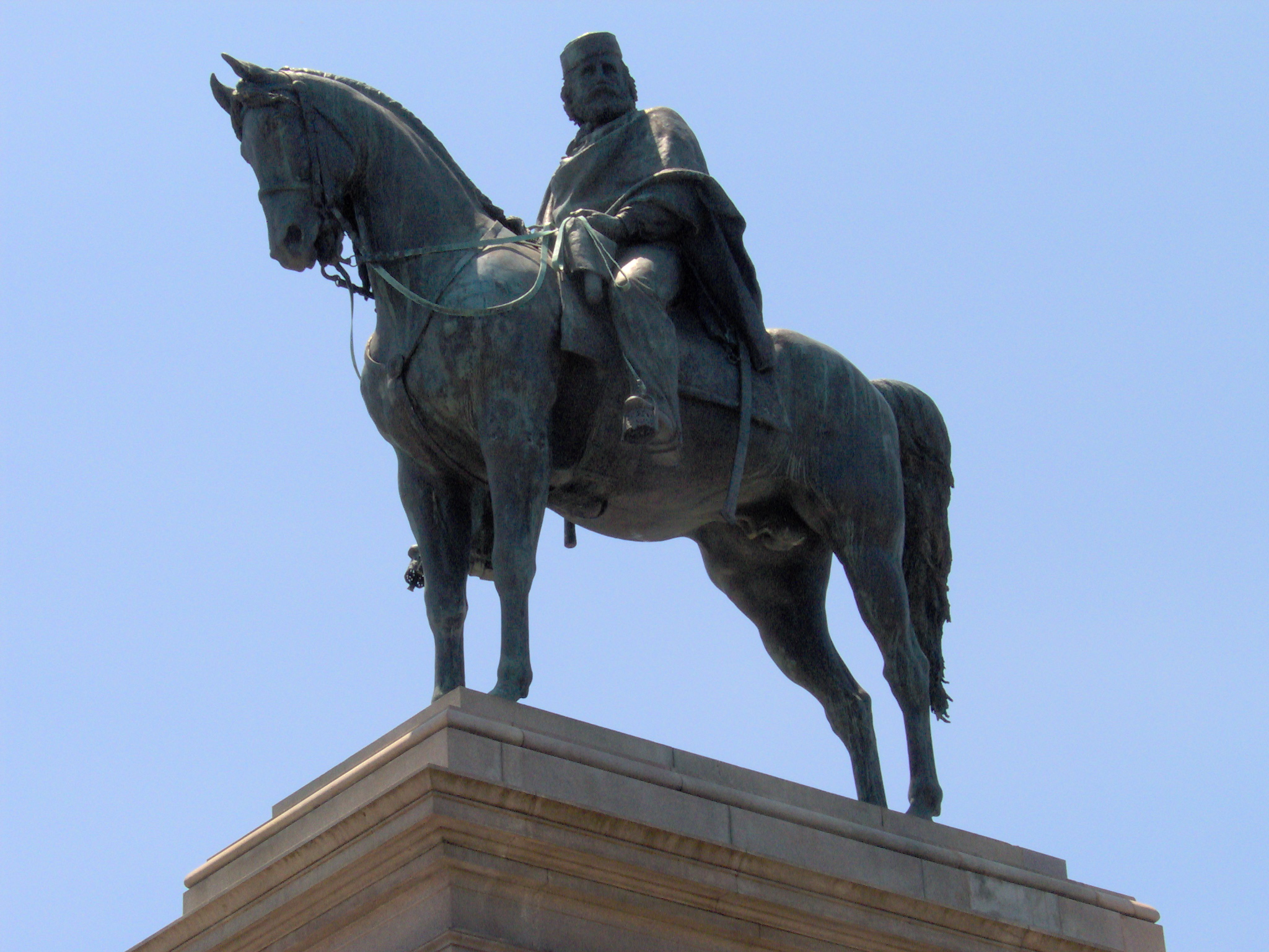 Emilio Gallori (1846-1924), Monumento equestre a Giuseppe Garibaldi (1895) al Gianicolo - Roma.